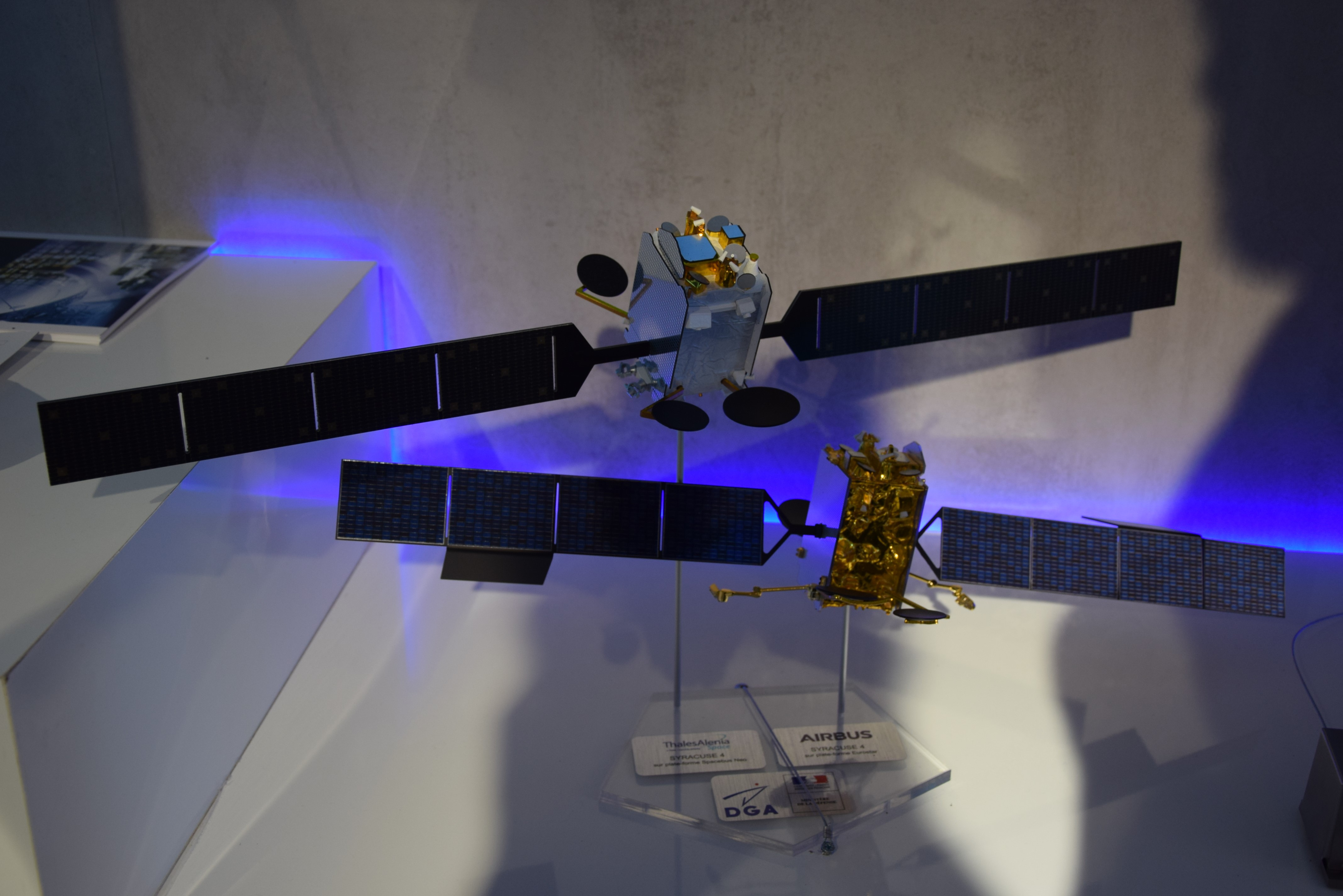 Maquettes des deux satellites Syracuse 4. Présenté au salon du Bourget 2017 au stand de la DGA